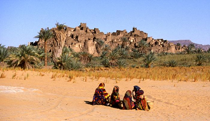 Auf dem Hügel die Ruinen der verlassenen Stadt Djada im Nordosten von Niger, vorn Nomadenfrauen.